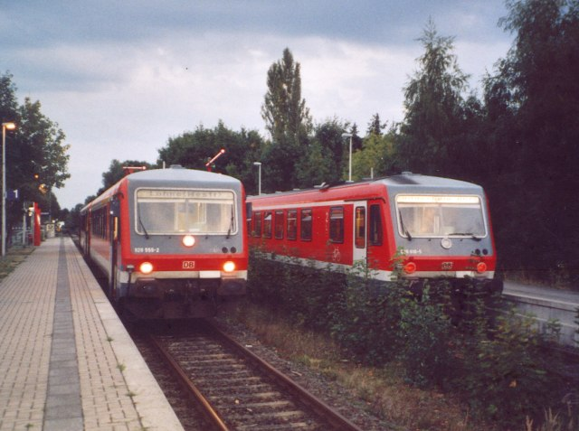 Zugkreuzung zweier 628 in Hessisch Oldendorf im Oktober 2003